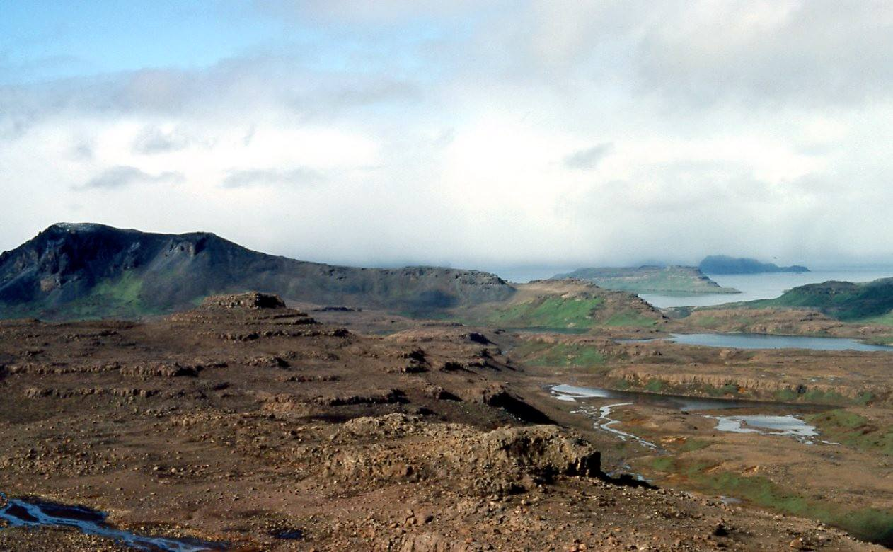 Site d'Armor à Kerguelen